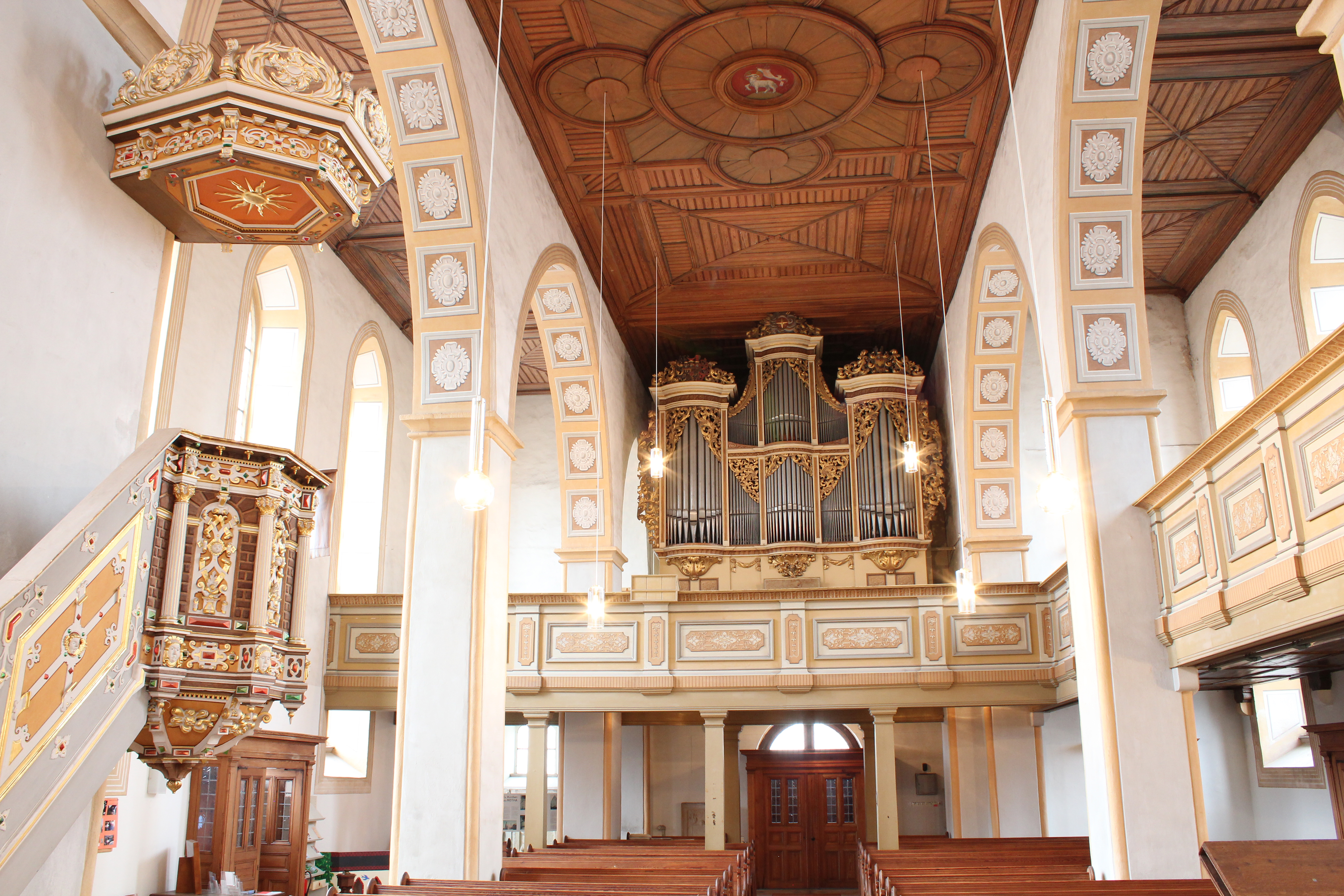 한국어 (조선): 뢰타 게오르겐교회 질버만오르간 1721년 제작